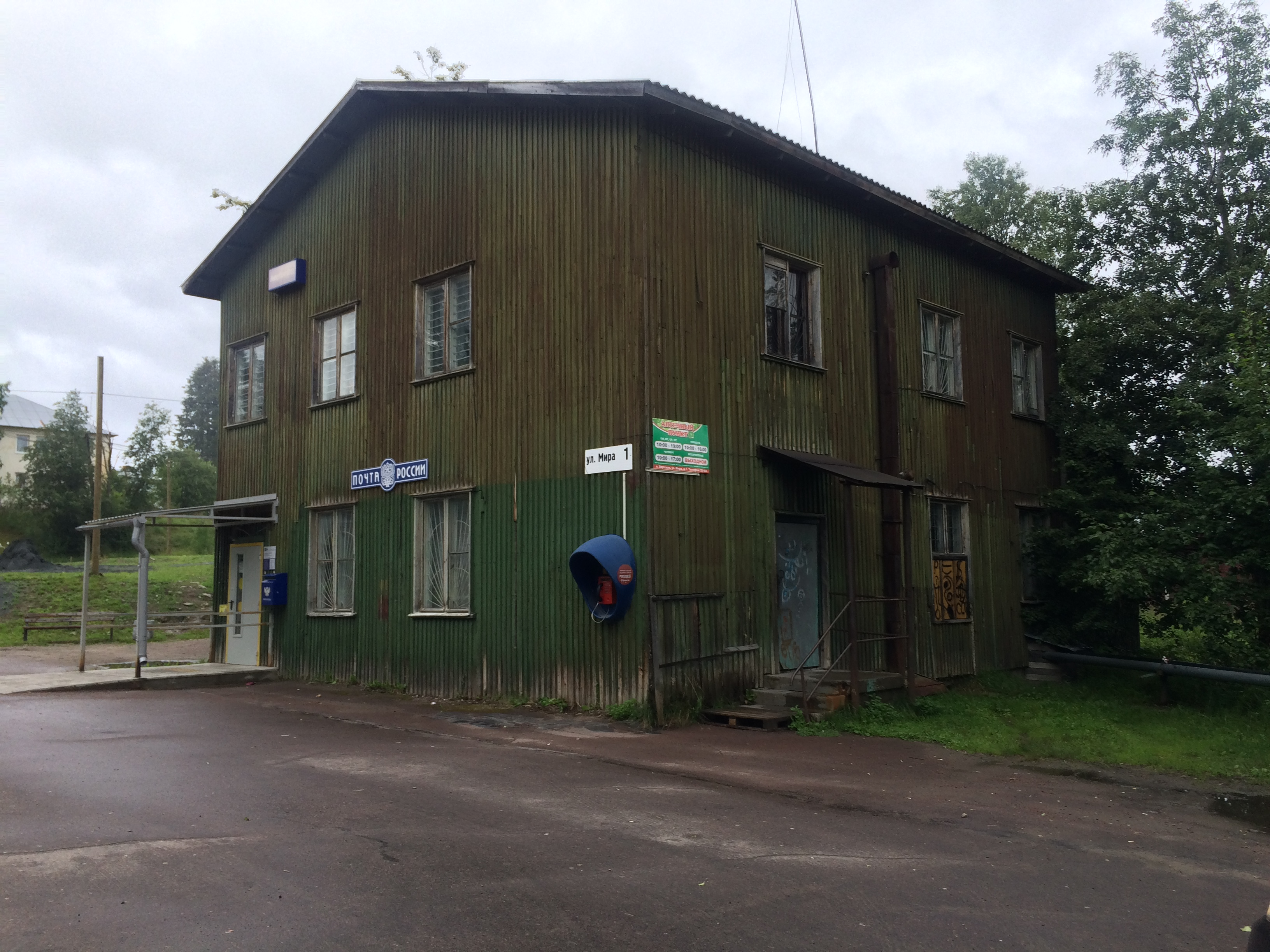 пгт Вяртсиля